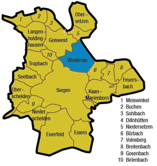 position of quarter Weidenau in Siegen